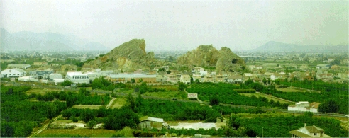 vista de La Cueva